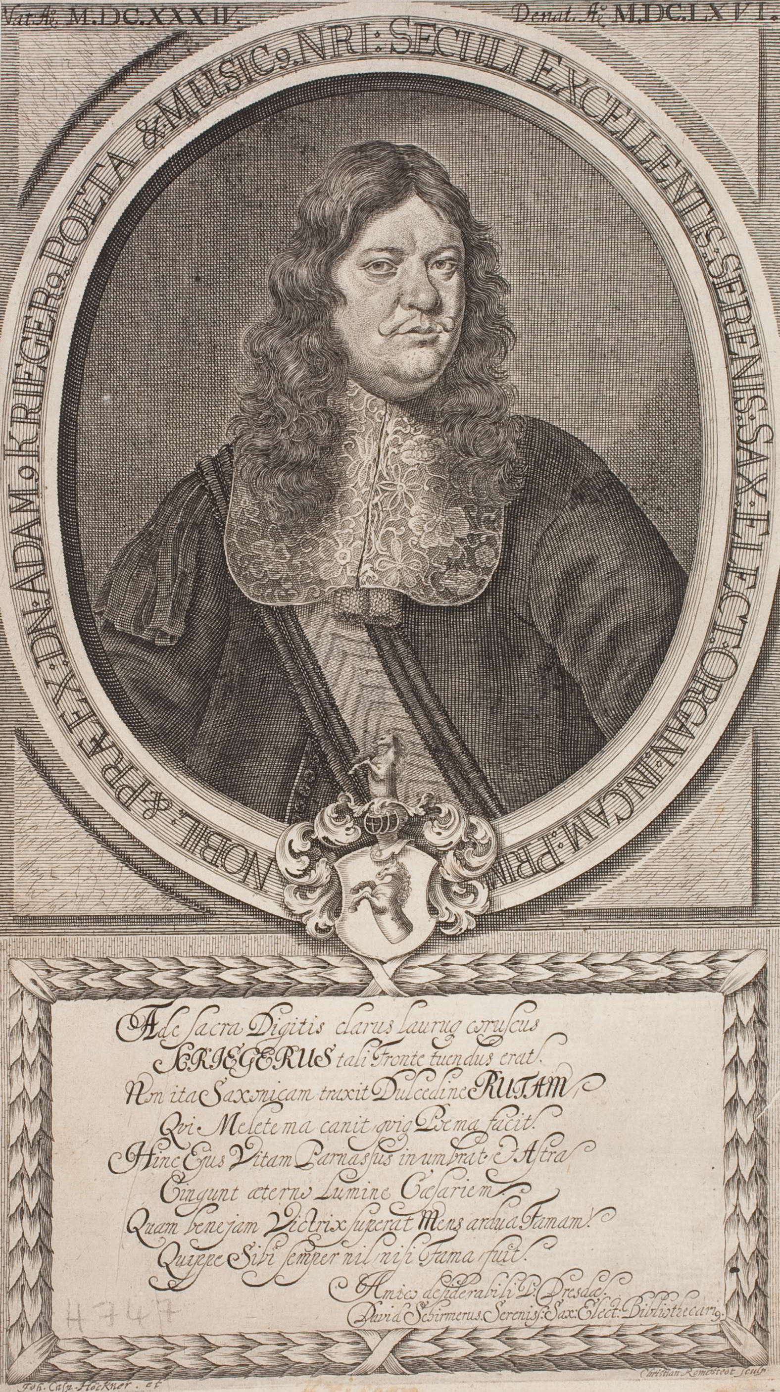 Depicted person: Adam Krieger